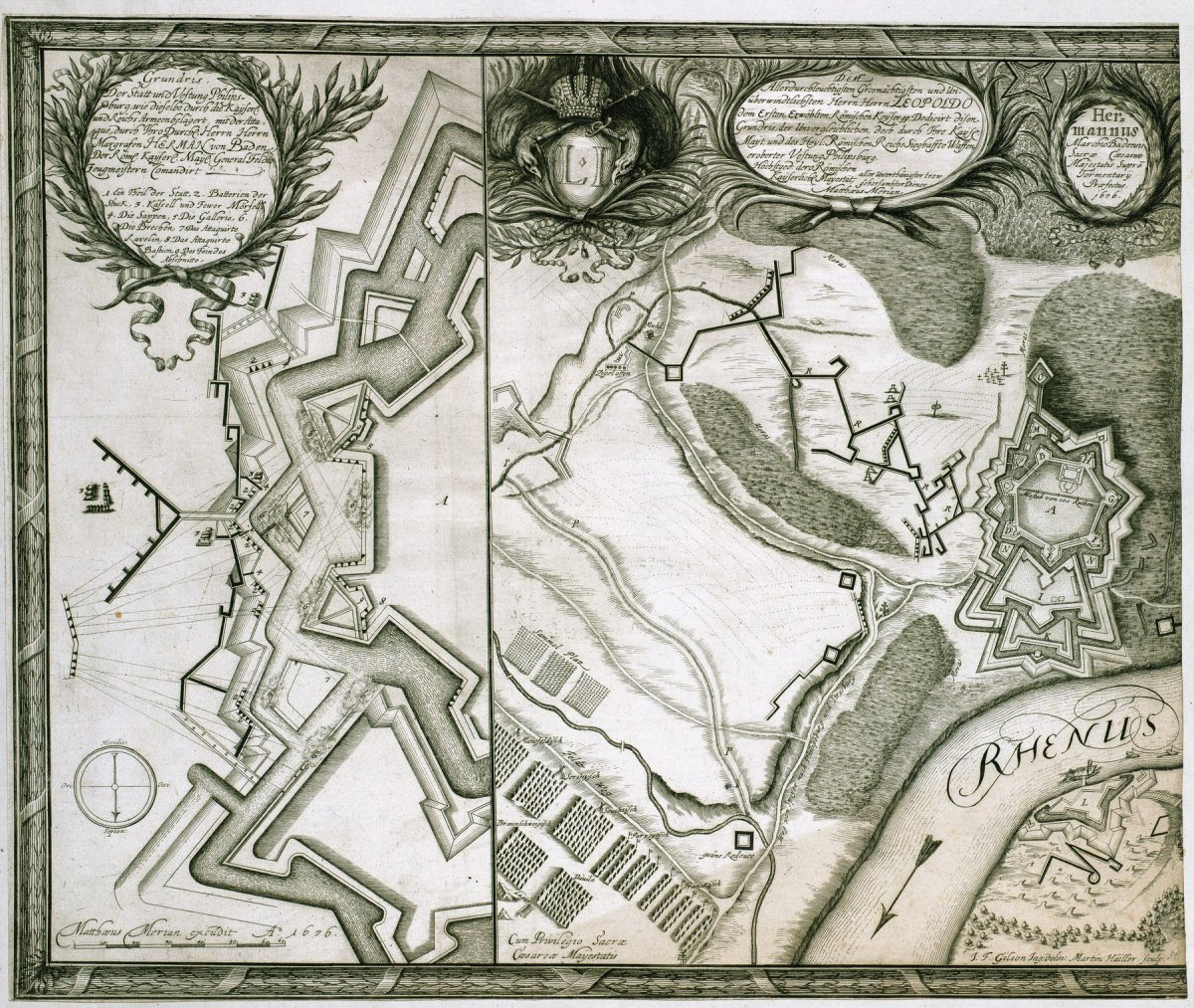 Kupferstich des Grundrisses von der Festung Philippsburg bei der Belagerung 1676